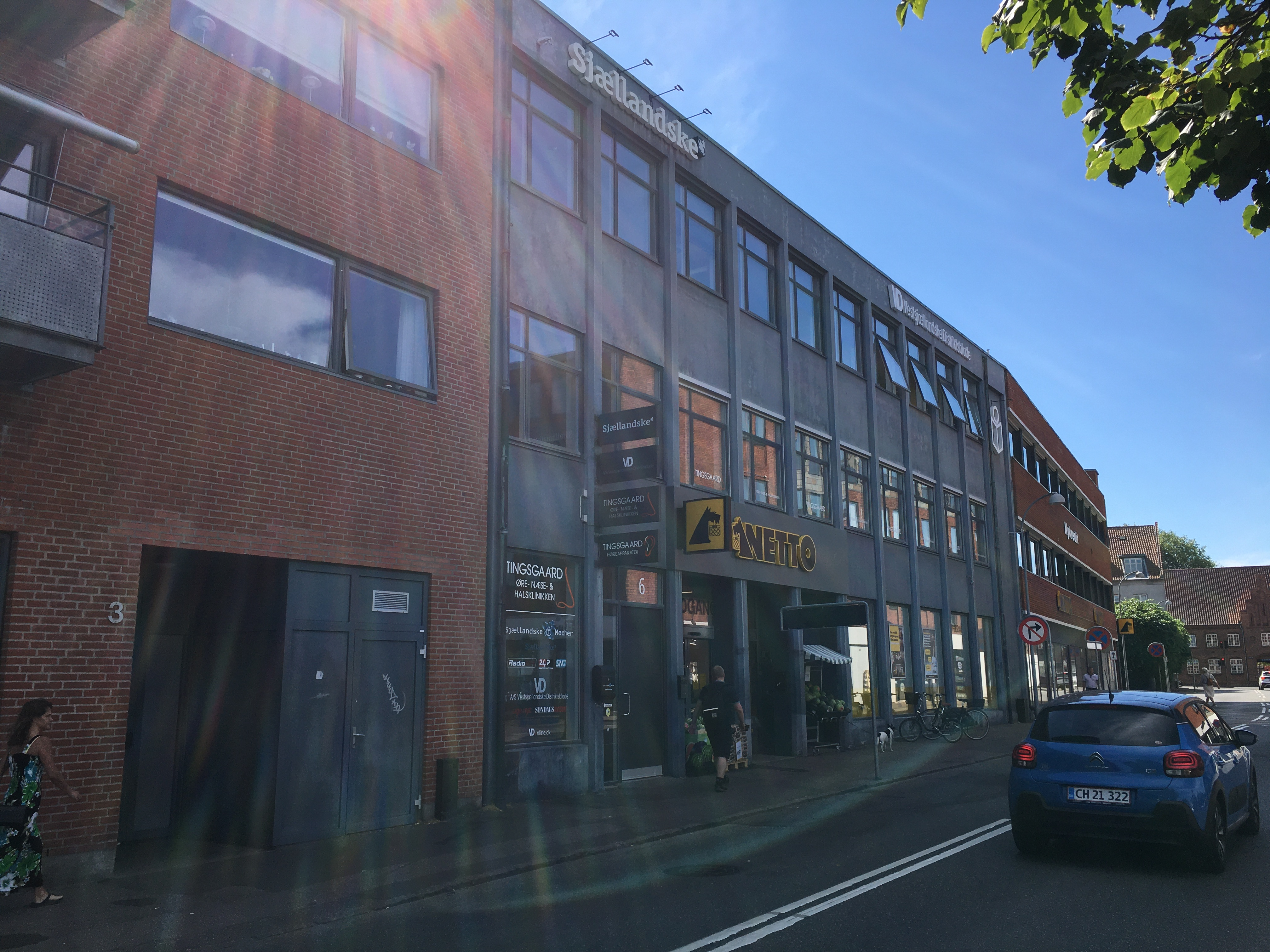 Sjællandske Medier i Slagele